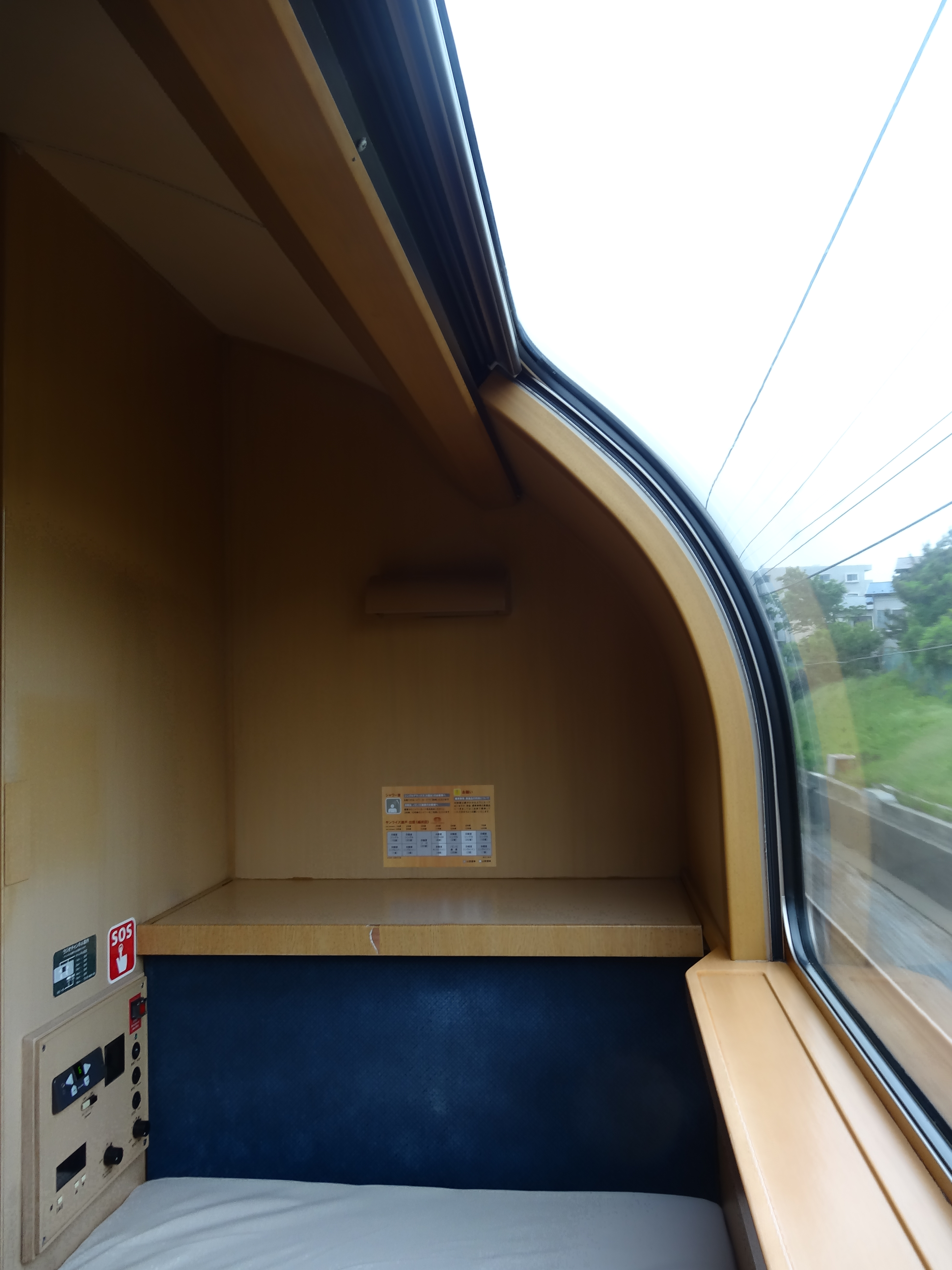 285系 シングルデラックス 室内